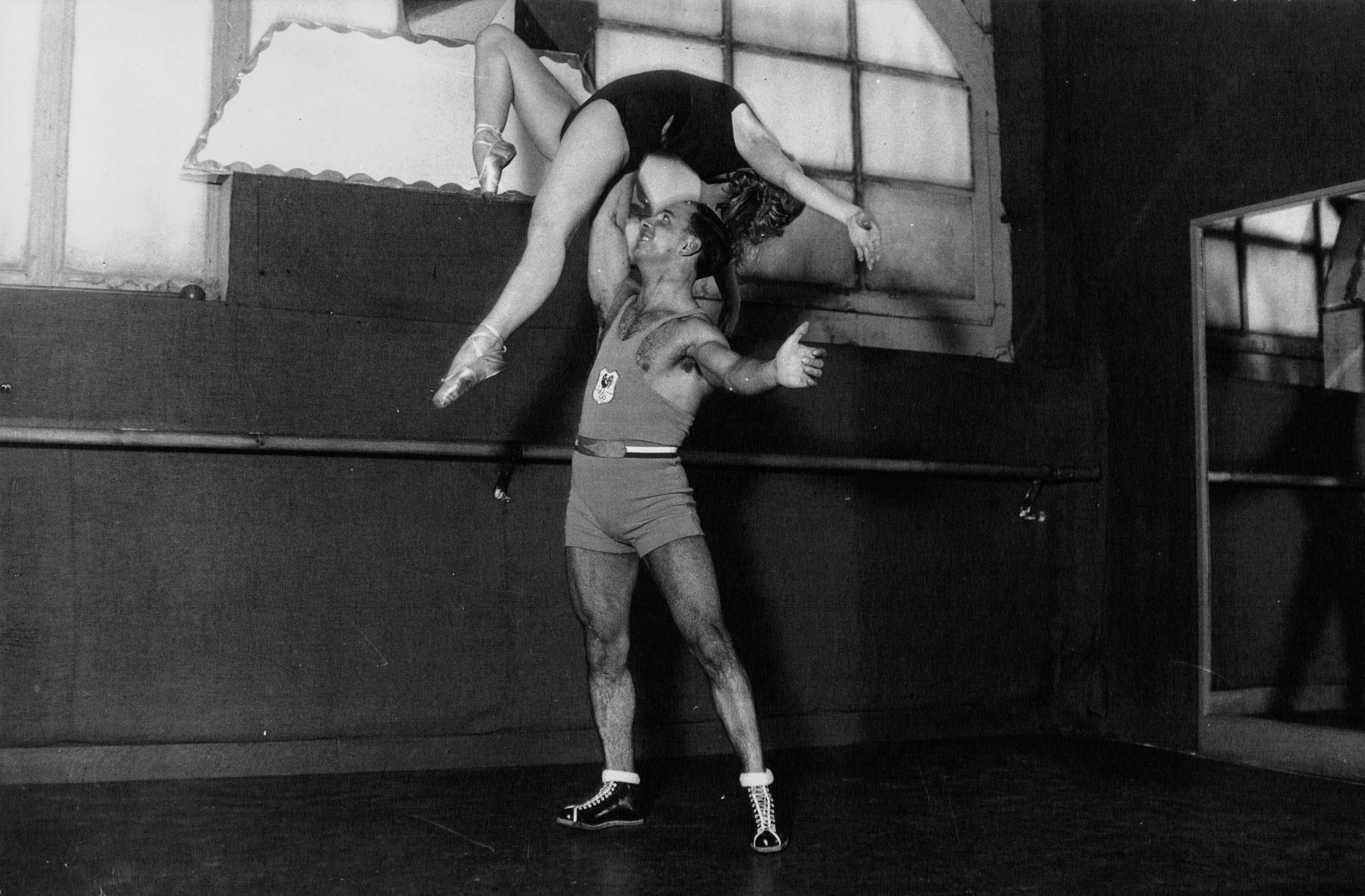 Duverger, champion olympique dans ses exercices de force.